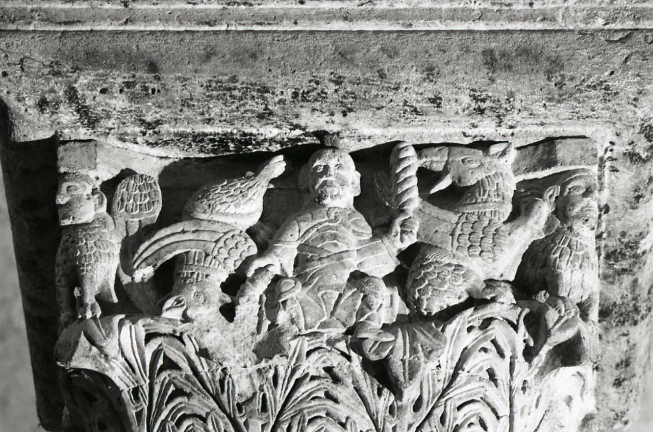 Servizio fotografico : Italia, 1970 / Paolo Monti. - Strisce: 7, Fotogrammi complessivi: 36 : Negativo b/n, gelatina bromuro d'argento/ pellicola ; 35 mm. - ((Sul portanegativi: NIKMAT FP4 e iscrizione: "Bitonto?". - Occasione: Documentazione per la pubblicazione: Calò Mariani Maria Stella, L'arte del Duecento in Puglia, Torino, Istituto Bancario San Paolo, 1984. - Fonte: Agenda di Paolo Monti: Leica 1501-3000 Controllo numerazione (1950-1978), presso Archivio Paolo Monti. - Fonte: Monografia di Prandi, Adriano: Cattedrali di Puglia, Roma, Bestetti (1969). - Fonte: Monografia di Calò Mariani, Maria Stella: L'arte del Duecento in Puglia, Torino, Istituto Bancario San Paolo (1984)